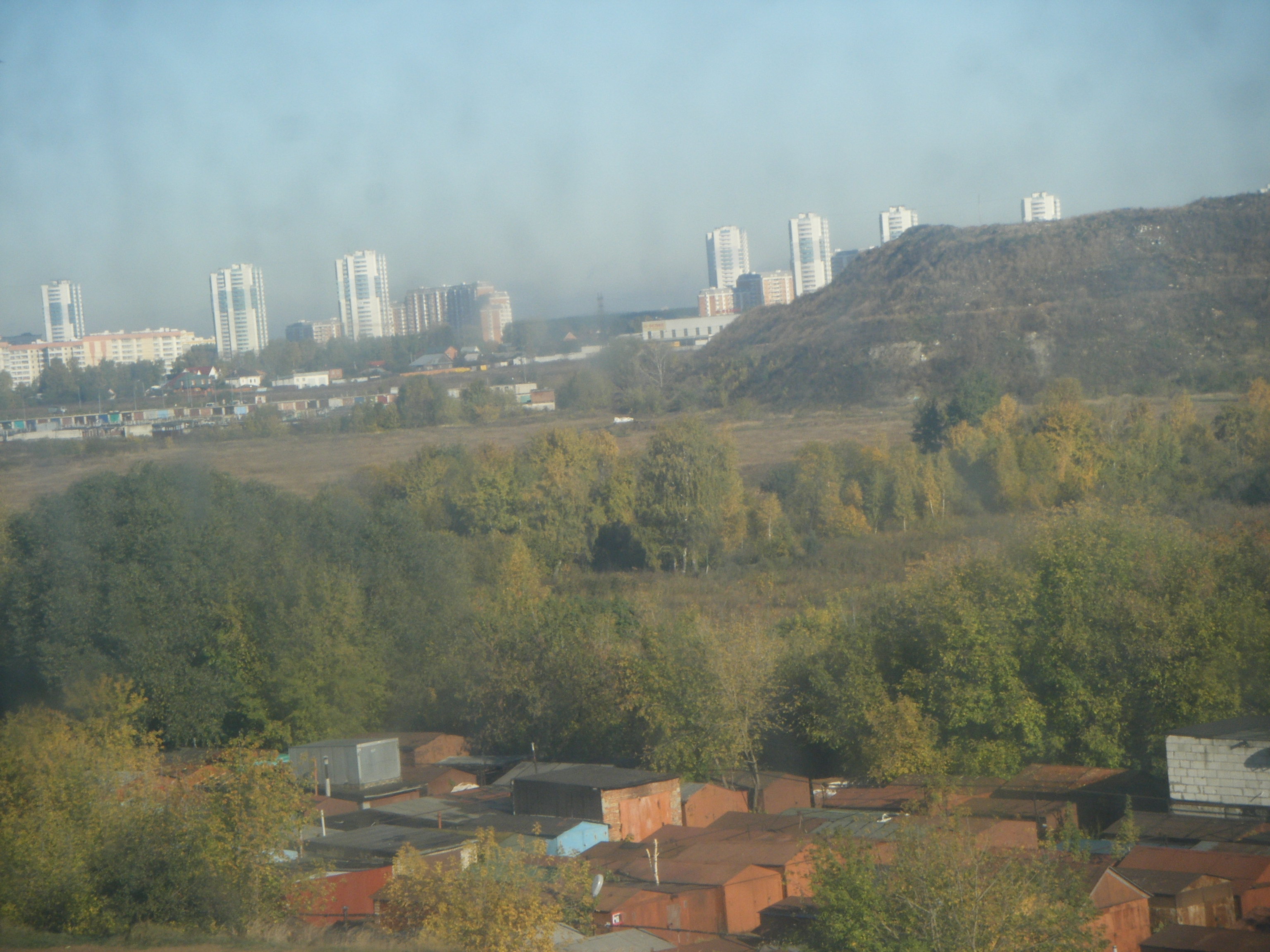 кожухово